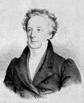 Porträt des Schauspielers, Theaterdirektors und Schriftstellers Friedrich Ludwig Schmidt (1772-1841)